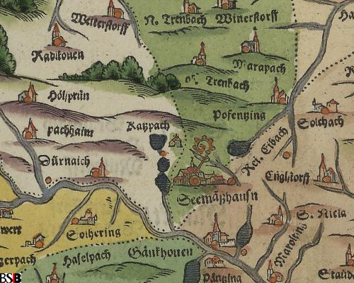 Kloster Seemannshausen Augustiner Gangkofen Apian Bayerische Landtafeln